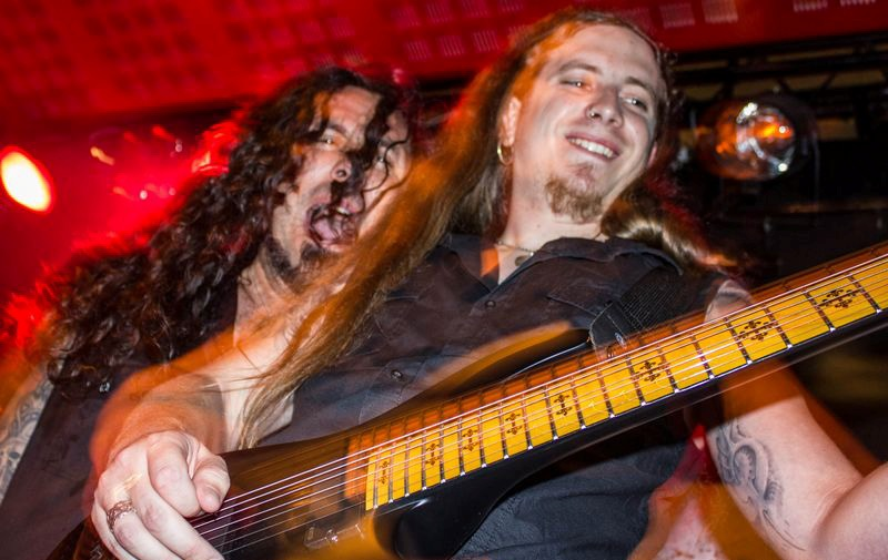 Pacho Brea y Yeray López, fundadores de Hybris, en un concierto en Madrid